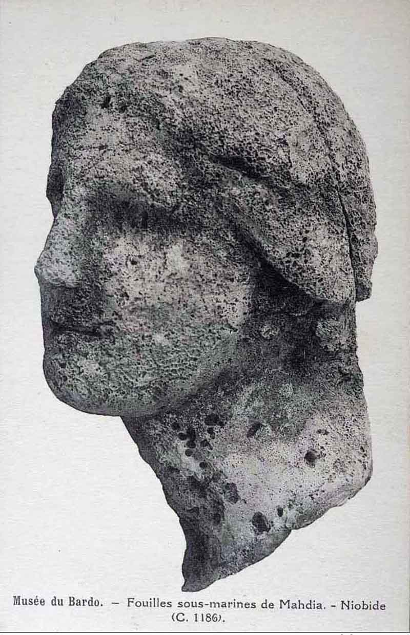 Niobide des fouilles de Mahdia